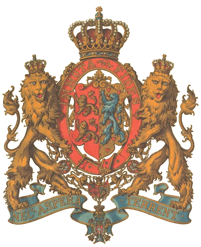 Das Kleine Wappen des Herzogtums Braunschweig mit Schildhaltern.